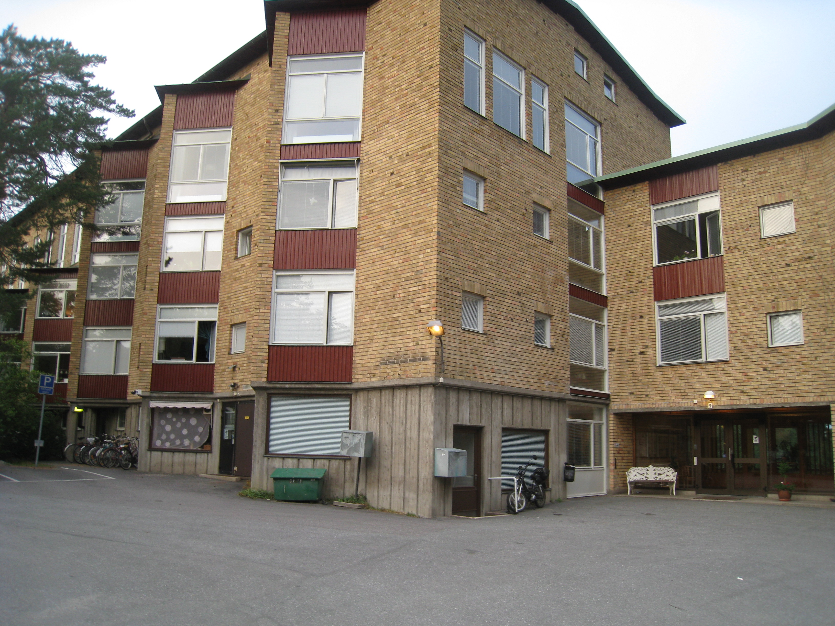 Elfvinggården, Lyckovägen 9, Äppelviken, inom stadsdelen Alvik, i Bromma väster om Stockholm. Fastigheten, som stod klar 1940, byggdes av byggmästaren Olle Engkvist och ritades av Backström & Reinius Arkitekter AB.